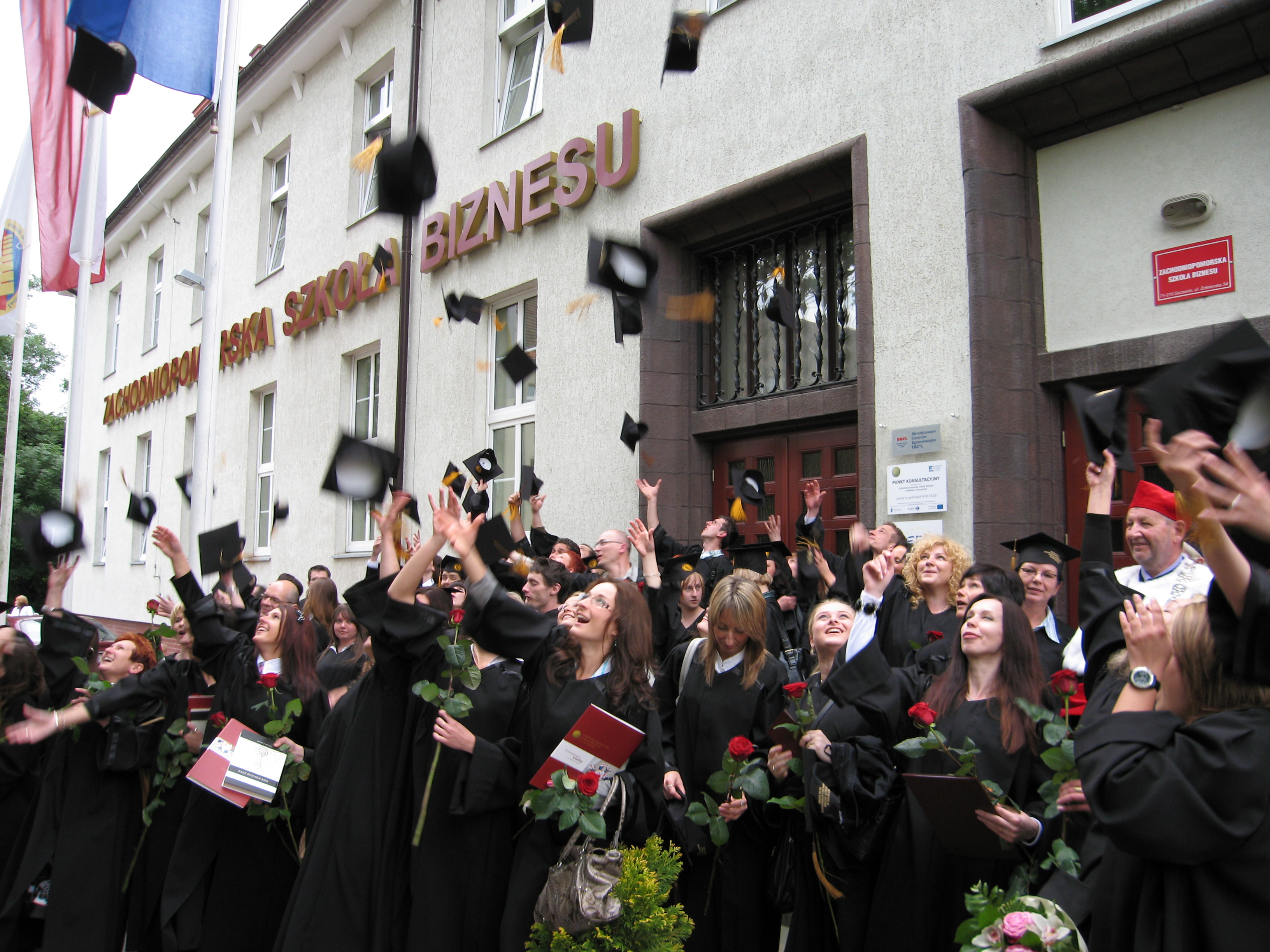 Absolwenci